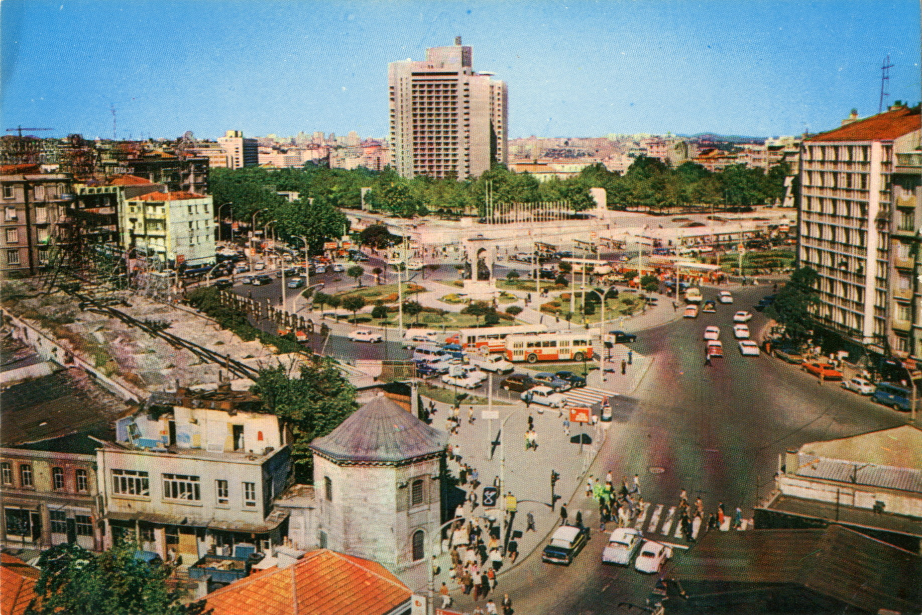 The Sheraton Hotel was constructed between 1968 and 1975 at the location of the architect Rüknettin Güney's Taksim Belediye Gazinosu (1940-1965). Taksim Square 1970s SALT Research, Söylemezoğlu Archive Parkın eşiğinde bir otel belirdi Taksim Vakıflar Oteli, İnönü Gezisi'nde (Taksim Parkı), mimar Rüknettin Güney'in Taksim Belediye Gazinosu'nun bulunduğu yere yapıldı. Otelin yapılabilmesi için belediyenin mülkiyetinde olan arsa Vakıflar Bankası'na satıldı. Otel için açılan sınırlı mimarlık yarışmasını 1959 başında Türkiye'den AHE Grubu kazandı. 27 Mayıs’ın ardından yatırım durduruldu. Daha sonra kurulan Taksim Otelcilik A.Ş. Sheraton ile anlaştı. 1968'de temeli atılan inşaat 1975’te sonlandı. Belediye Gazinosu (1940-1965). Taksim Meydanı 1970’ler SALT Araştırma, Söylemezoğlu Arşivi